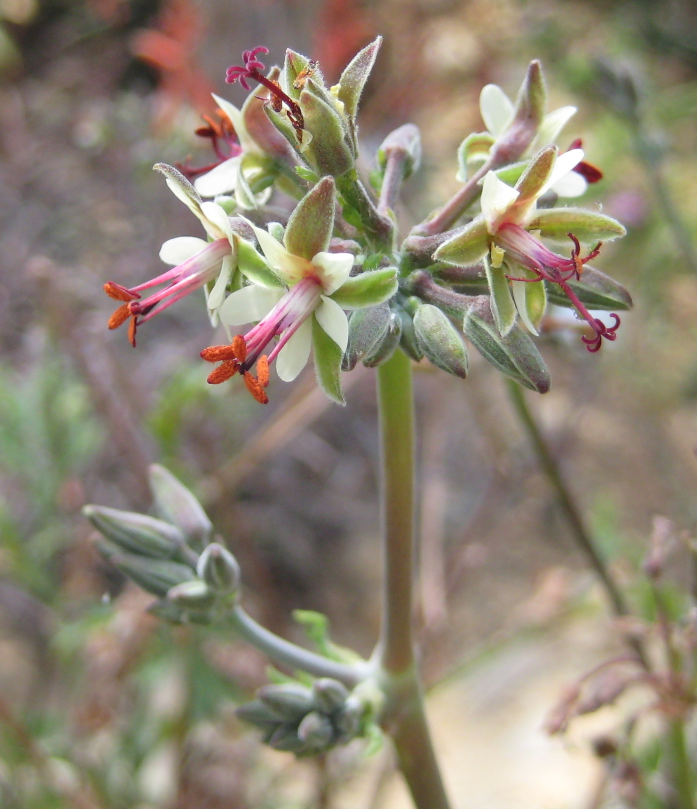 Pelargonium dasyphyllum im Botanischen Garten Dresden